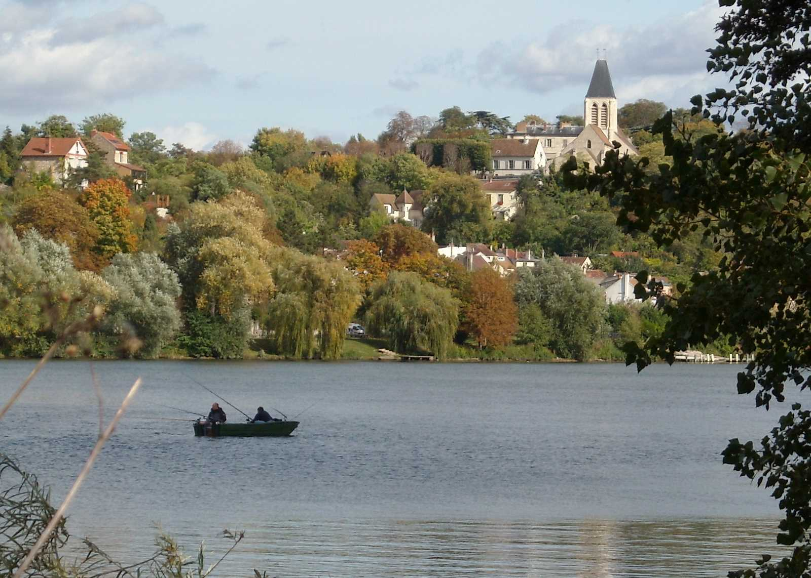 Vue du bourg d'Herblay et son église depuis la rive opposée de la Seine à la commune.